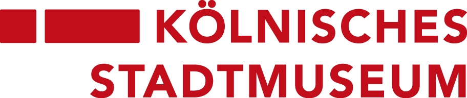 Logo des Kölnischen Stadtmuseums seit 2012